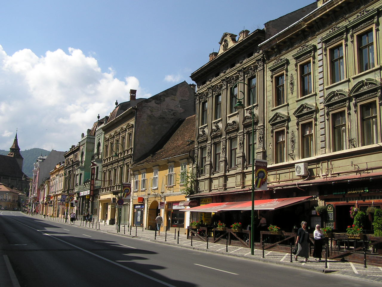 Häuser in der Strada Mureşenilor, Brașov / Kronstadt, Siebenbürgen, Rumänien.